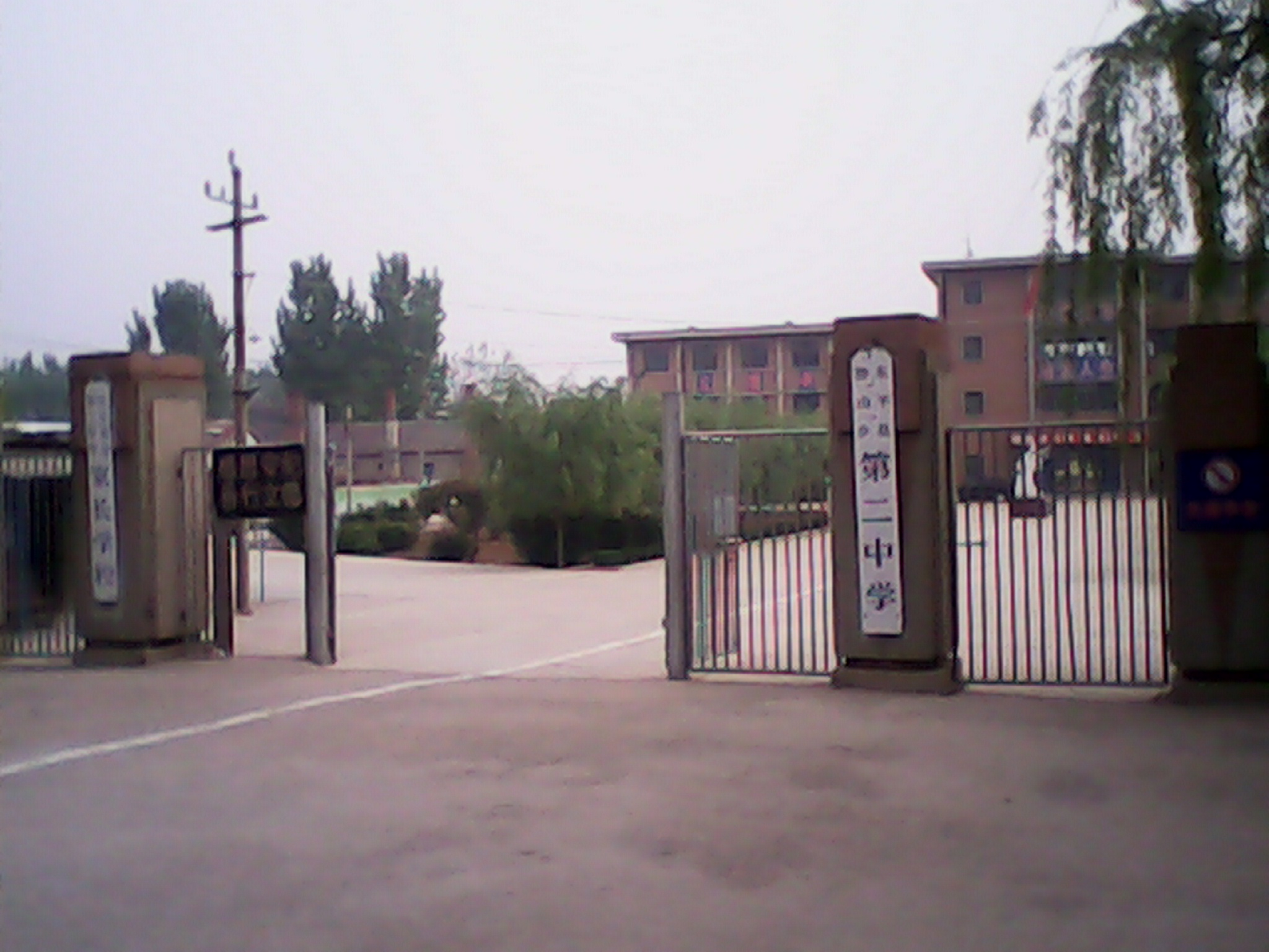 东平县张河桥村